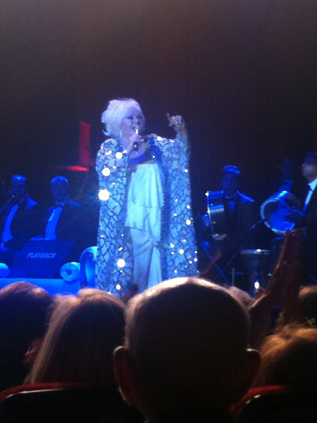 Adnan Şenses, Bülent Ersoy, Muazzez Abacı üçlüsü tarafından Bostancı Kültür Merkezi'nde düzenlenen Klasik Türk Müziği konserinde Bülent Ersoy sahne performansıyla, 9 Nisan 2012.